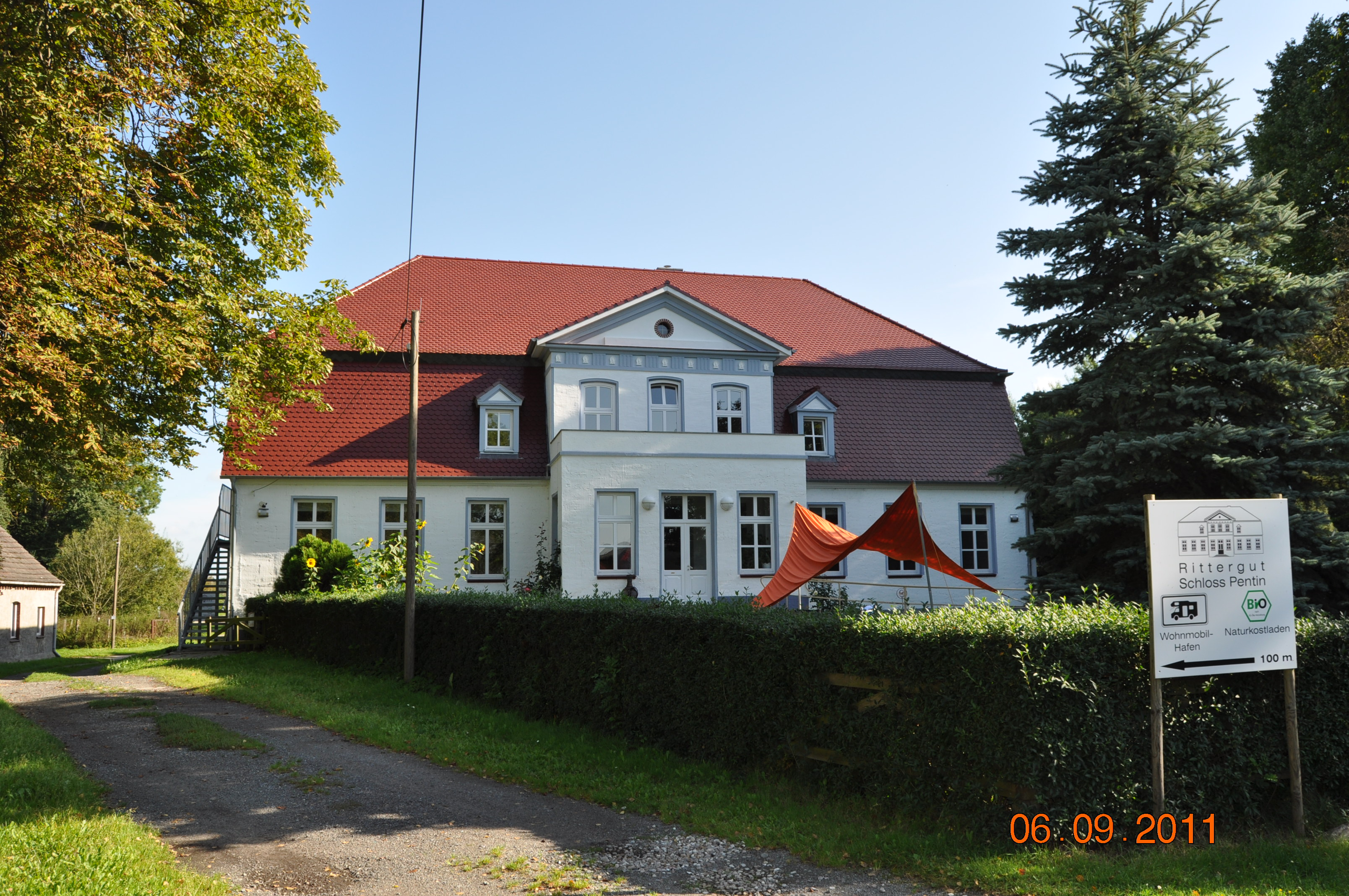 Gutshaus Pentin - langjähriges Kinderheim